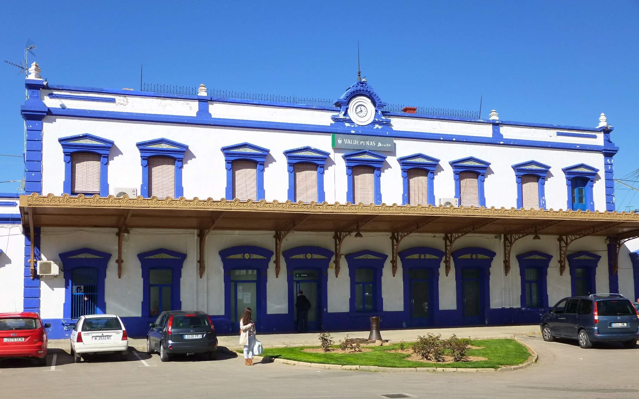 Estación de ADIF de Valdepeñas (Ciudad Real)